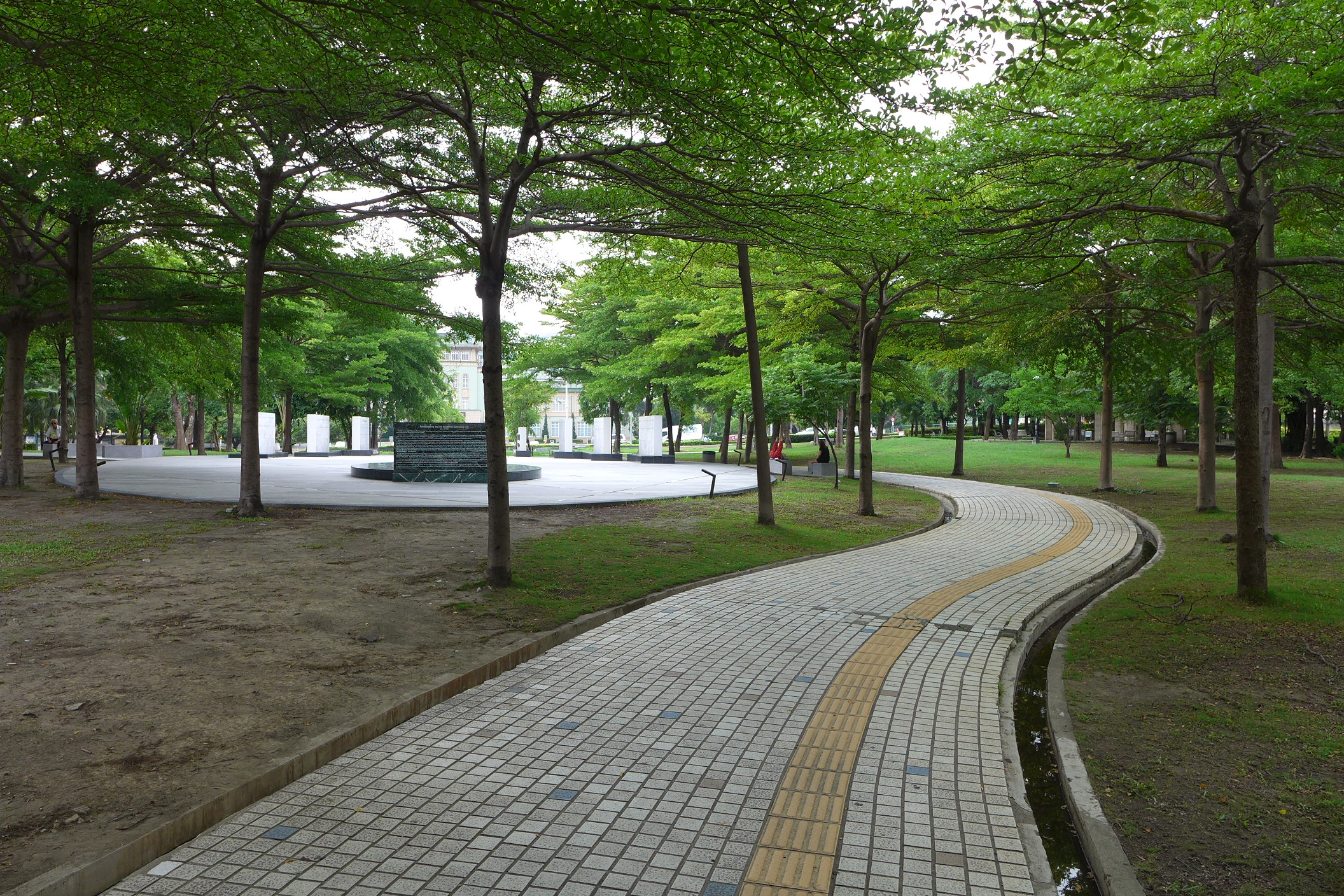 中文（台灣）: 高雄市二二八和平紀念公園，遠方建築為高雄市立歷史博物館。